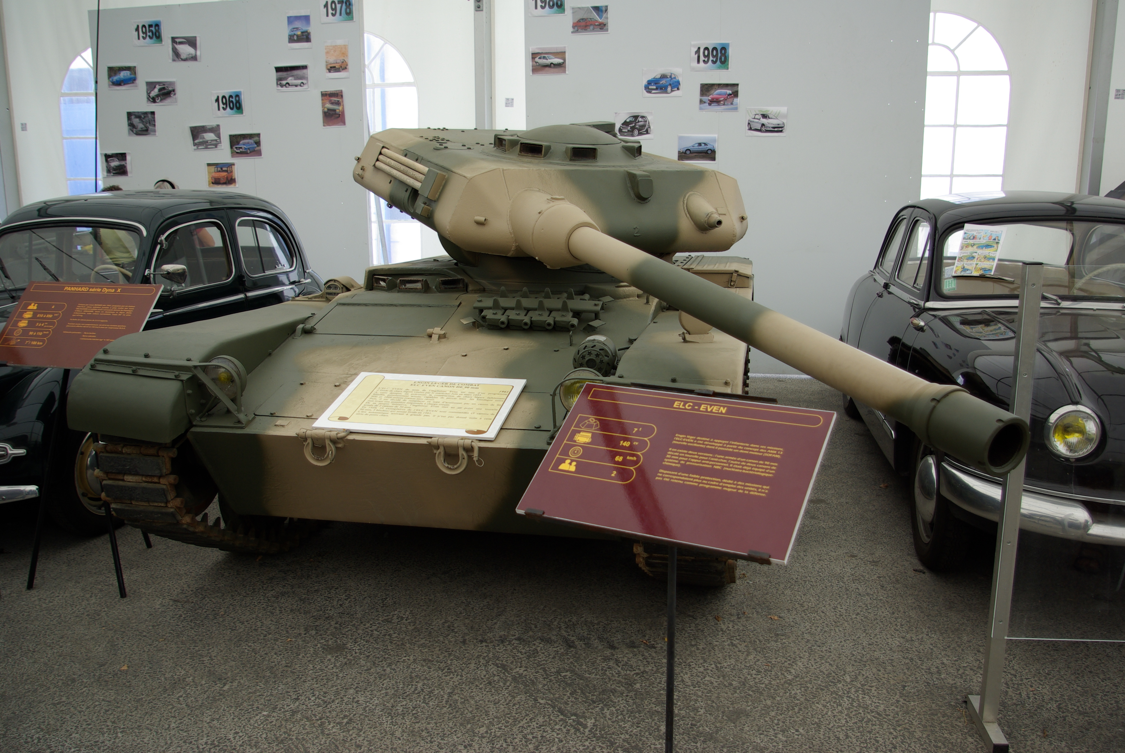 ELC EVEN équipé d'un canon de 90mm au Musée des Blindés de Saumur.